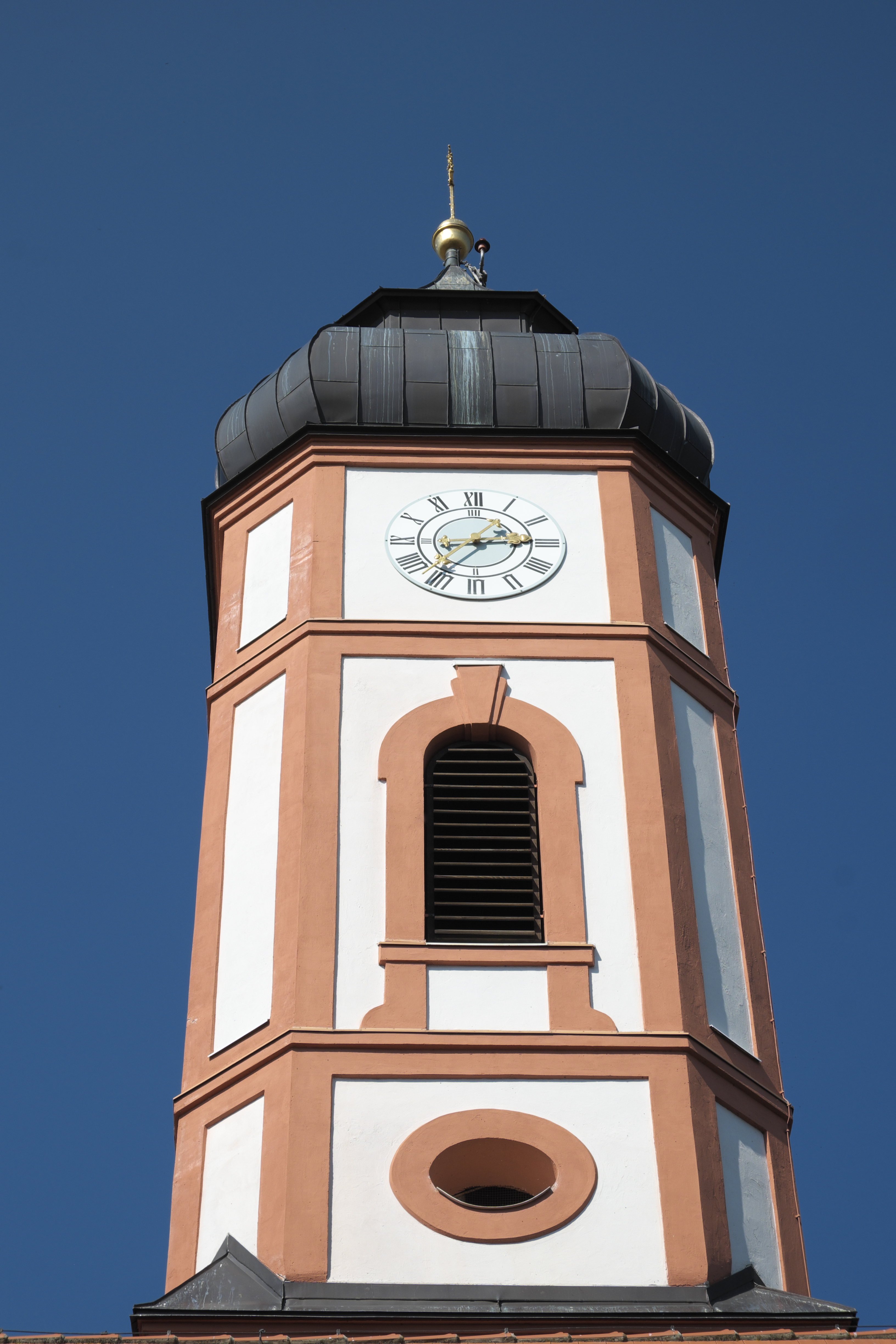 Katholische Filialkirche St. Sebastian in Puch, einem Stadtteil von Fürstenfeldbruck im Landkreis Fürstenfeldbruck (Bayern/Deutschland), Glockenturm